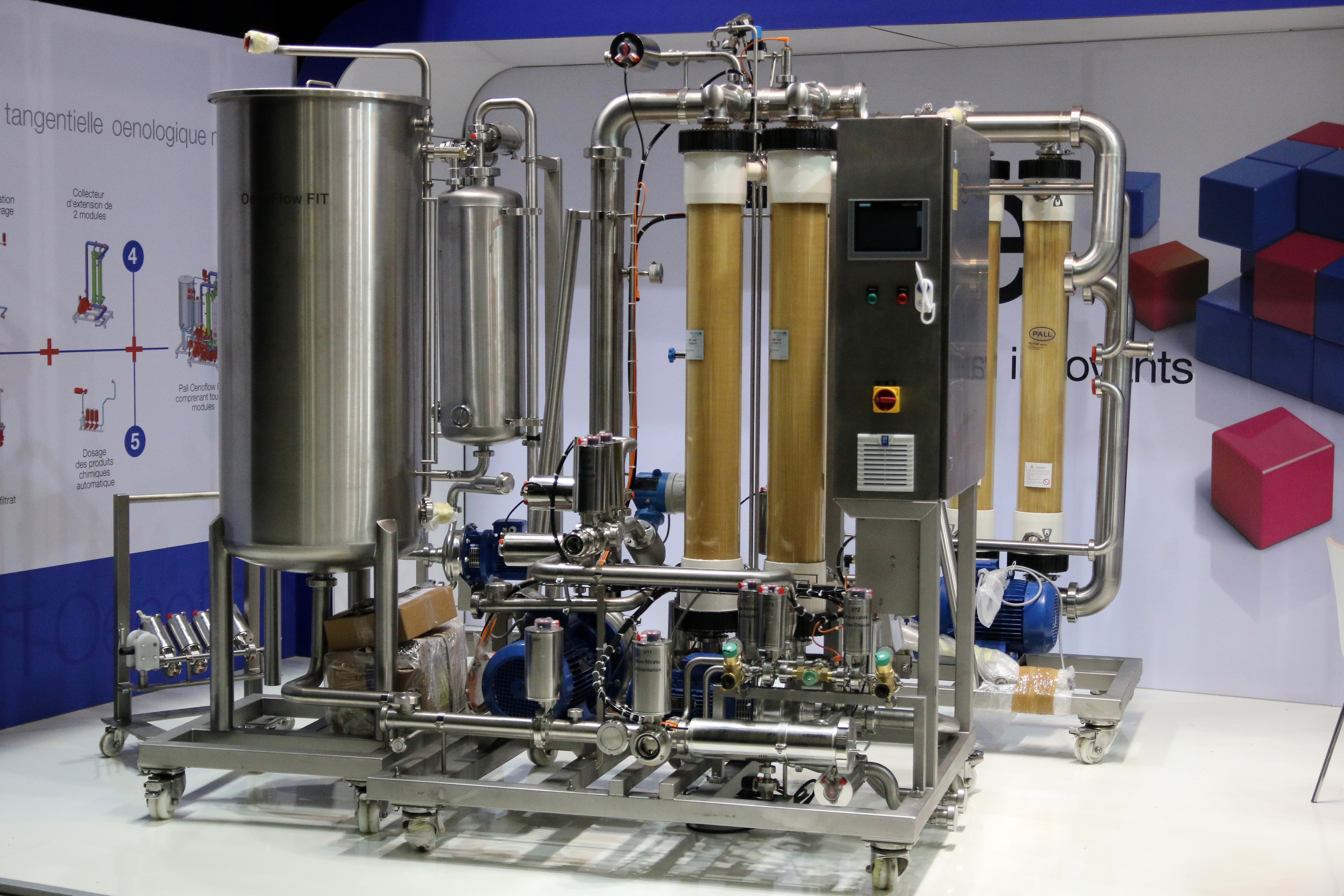 Filtre tangentiel vinicole